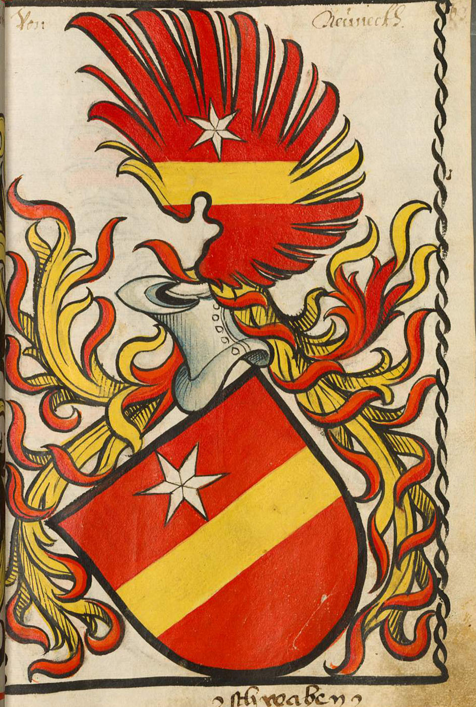 Scheibler'sches Wappenbuch, älterer Teil Neuneck